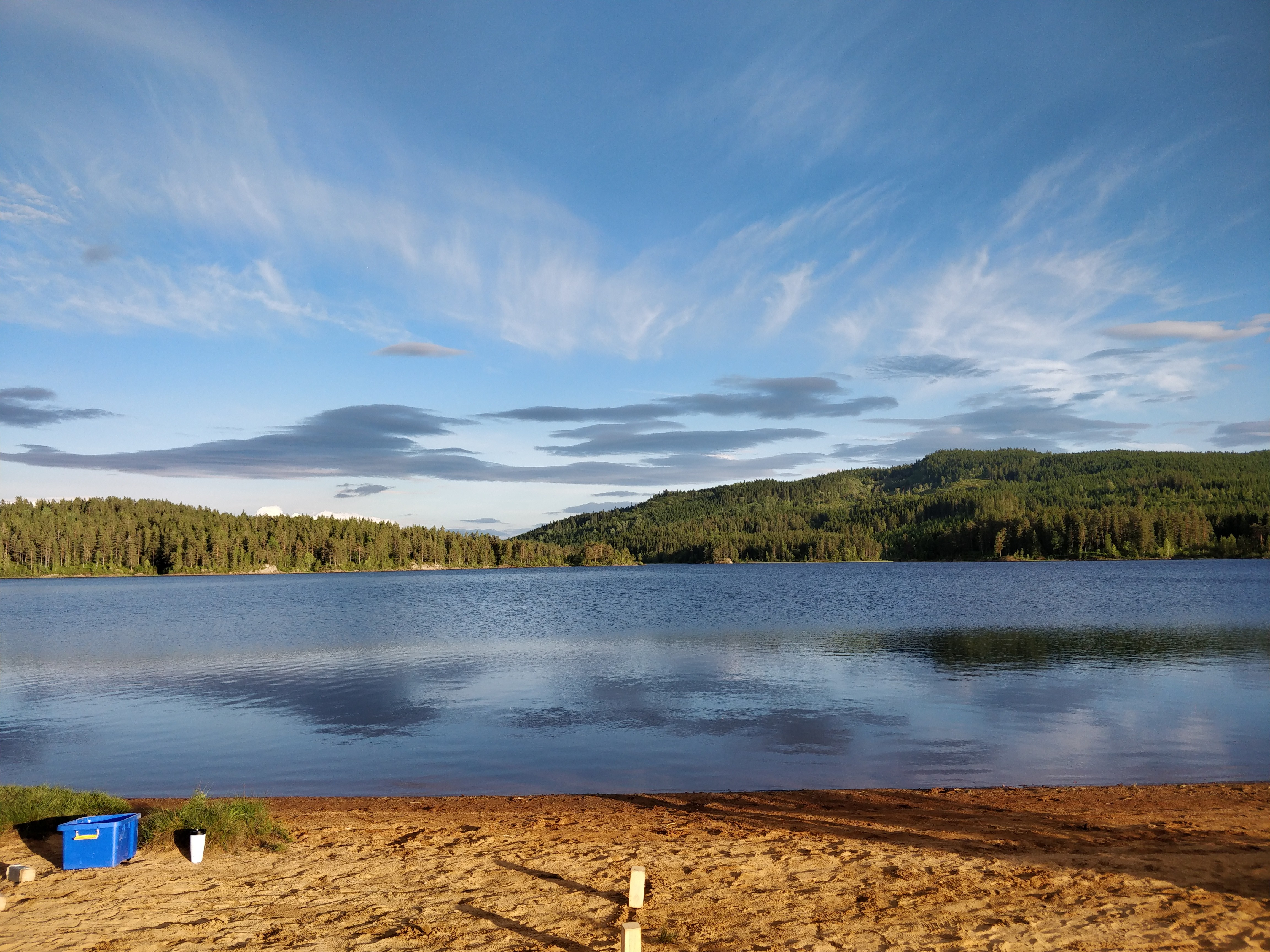 Svartangen, Larvik. Utsikt over Svartangen fra Nord. Nærmere sagt fra strand-områdene.